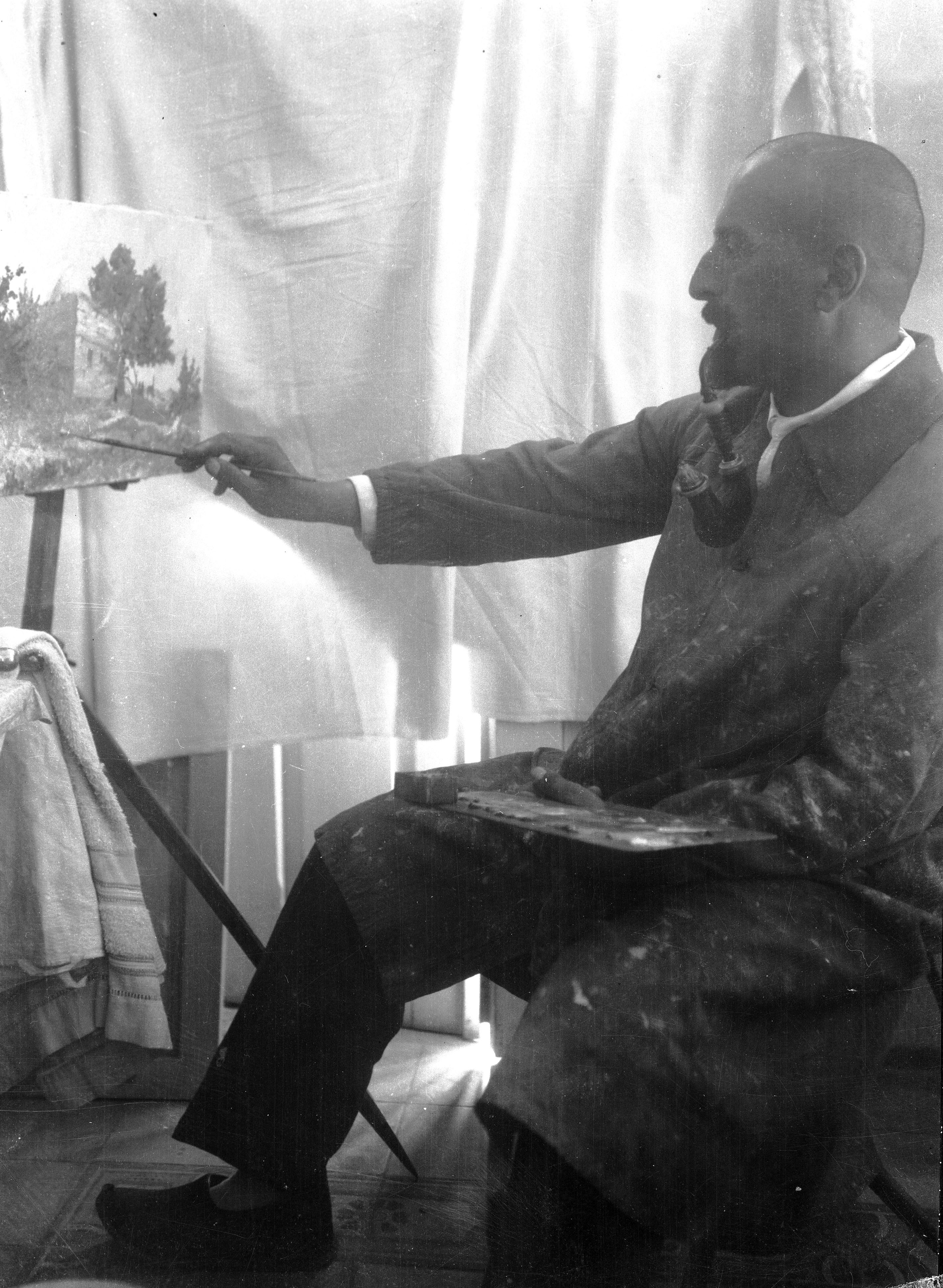 האדריכל אלכסנדר ברוולד מצייר